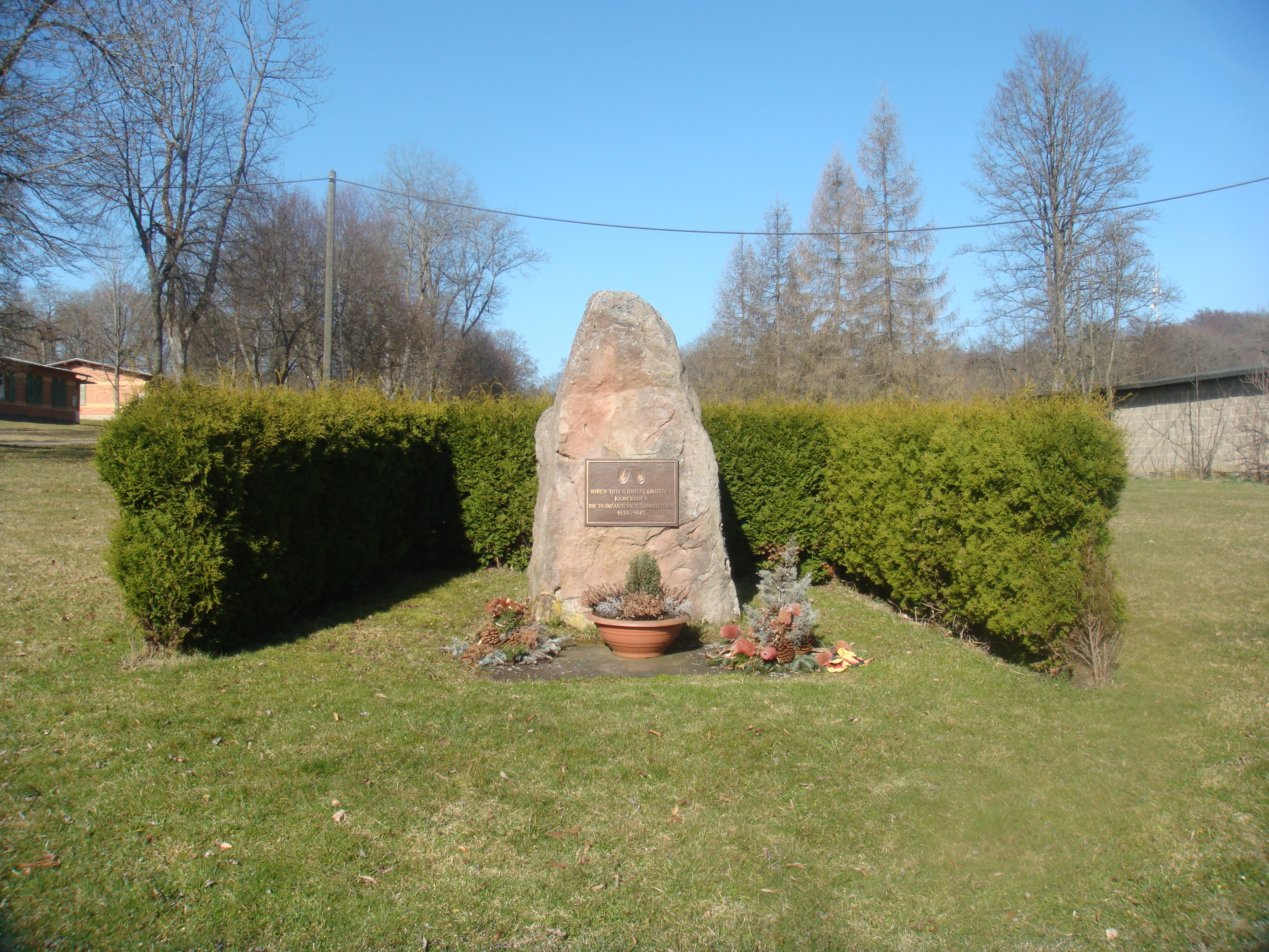 Gedenkstein für die 78. Infantrie-Sturm-Division im Alten Lager des ehemaligen Truppenübungsplatz Münsingen.